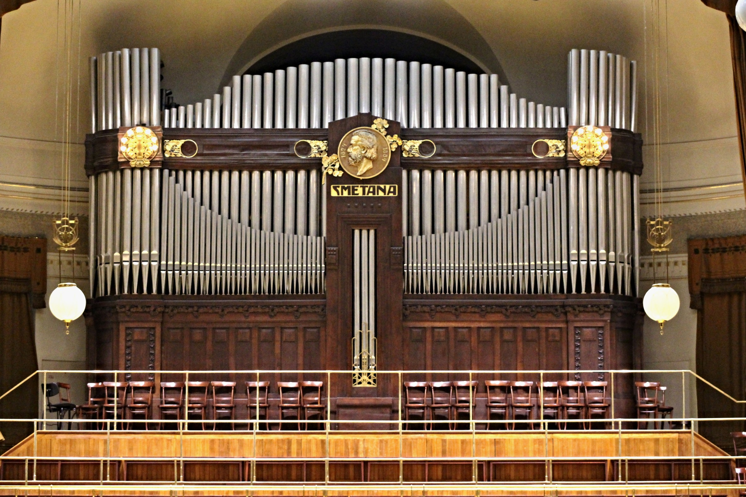 Interiér Smetanovy síně Obecního domu, Praha